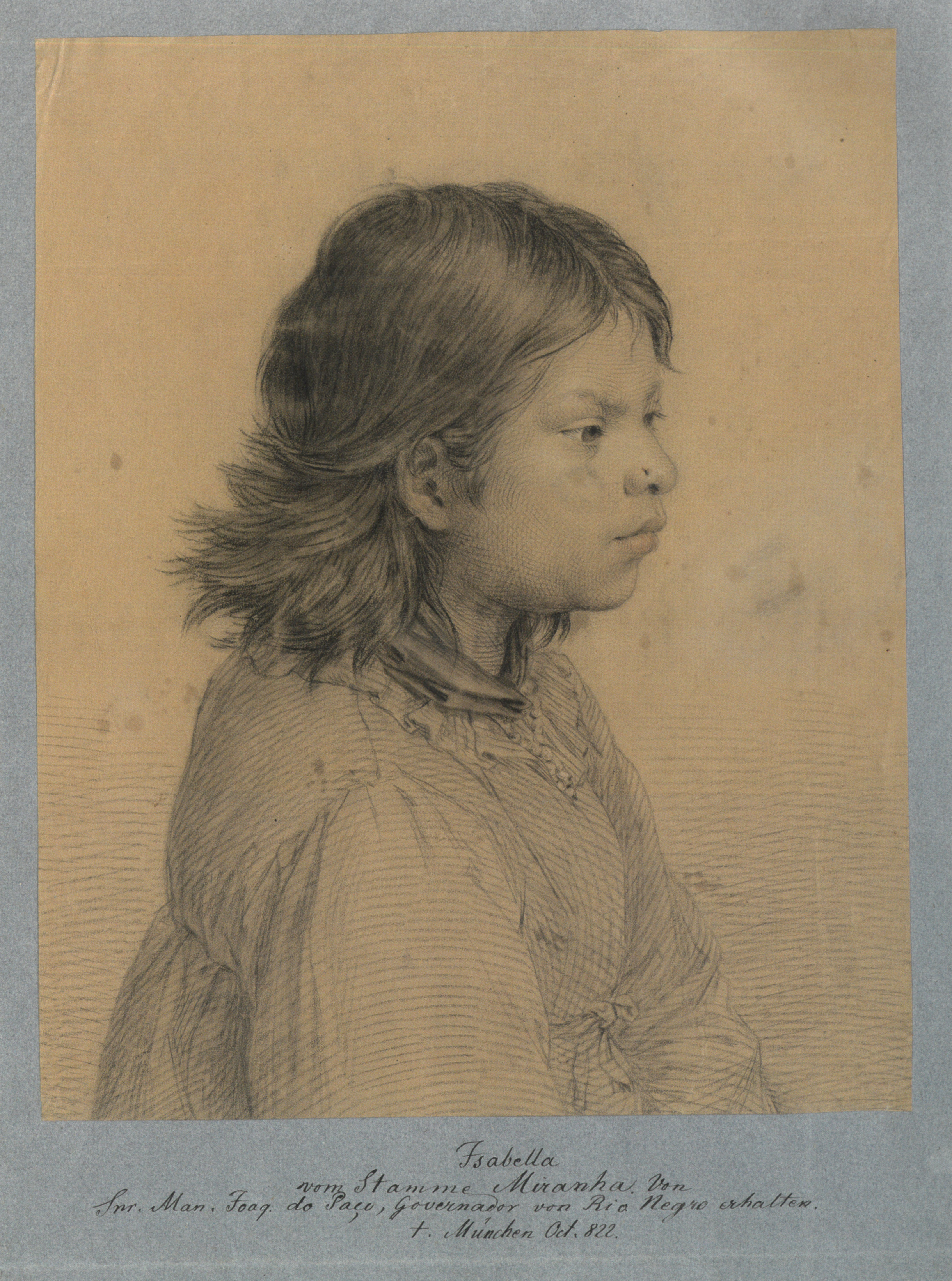 Isabella aus dem Volk Miranha aus Brasilien. Sie wurde 1820 von Spix und Martius von Brasilien nach München (Deutschland) mitgebracht. Sie starb am 22. Mai 1822 in München und wurde hier begraben.